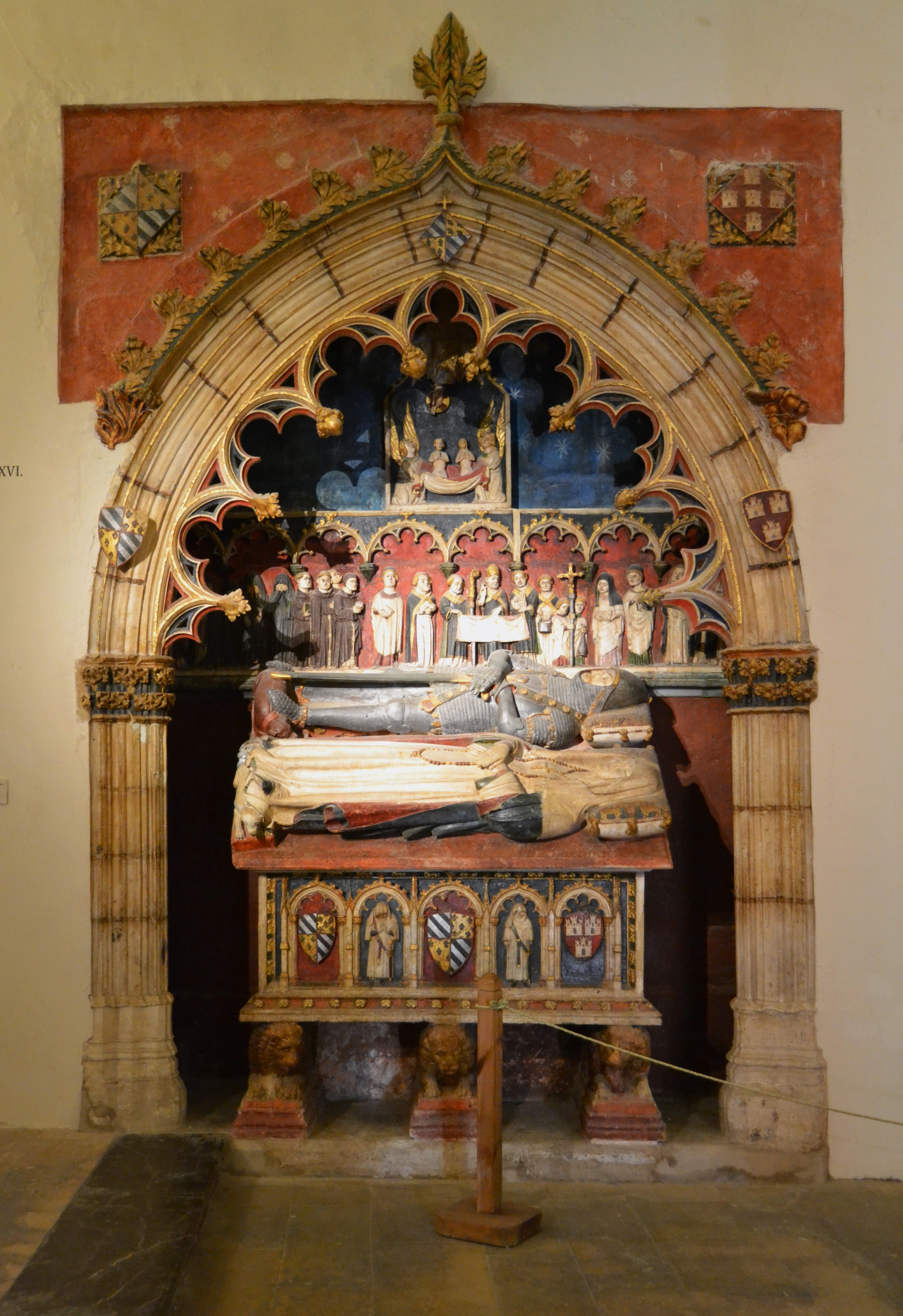 Sepulcre dels Vallterra, capella del Salvador de la catedral de Sogorb.